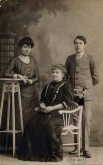 Mathilde Delporte-Mauté et ses deux enfants, Felix et Suzanne